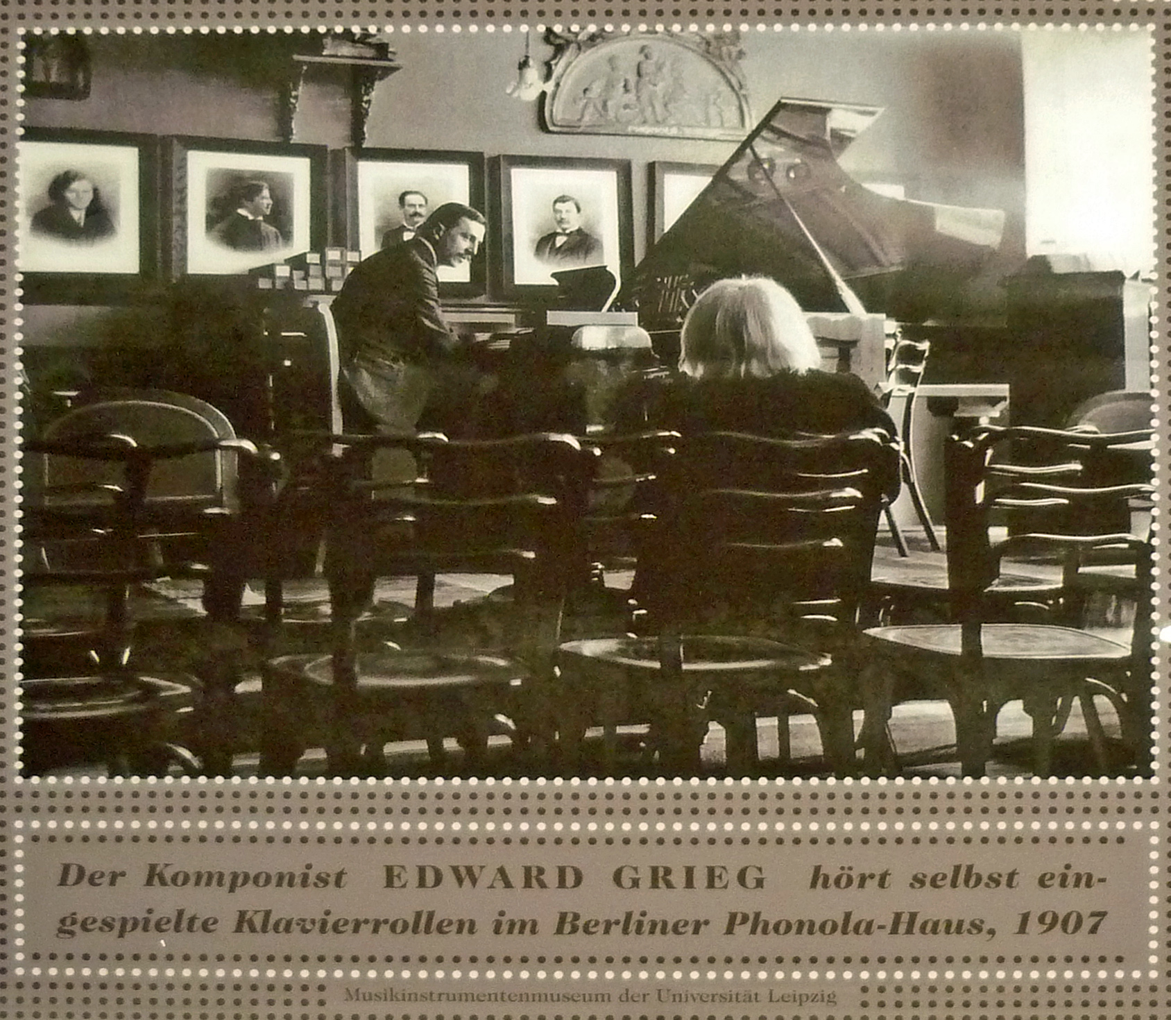 Technische Sammlungen Dresden: Musikaufnahme bei der Hupfeld AG, hier mit Edward Grieg